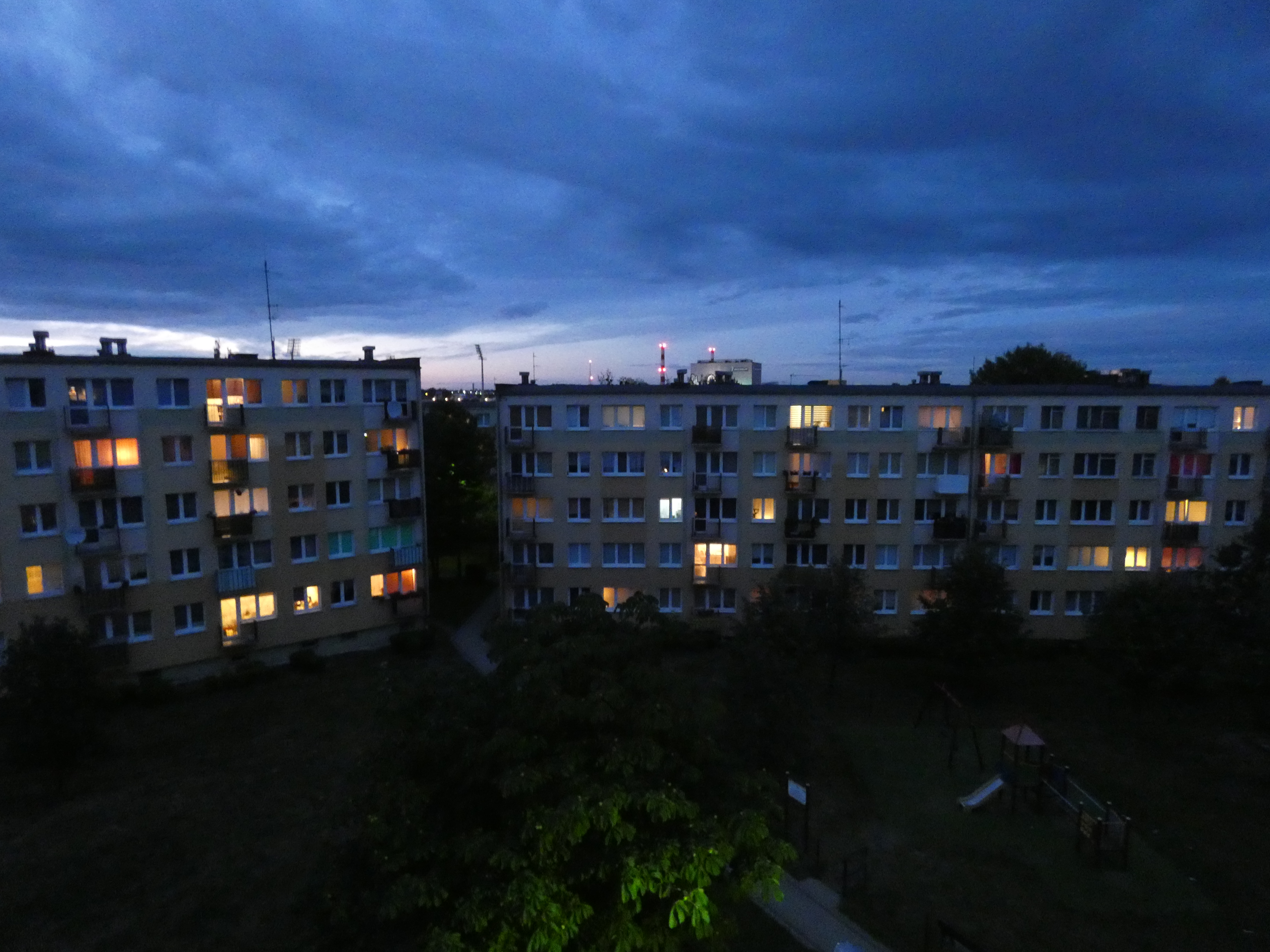 Widok fabryki od strony Osiedla Kormoran.